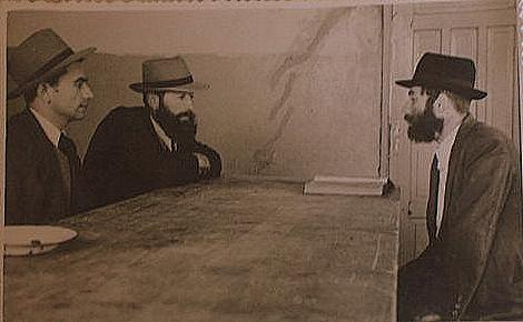 הרב שטיינמן (מימין) בישיבה בכפר סבא יחד עם מנהל הישיבה ר' אברהם ריין והרב שמואל אליהו אורלנסקי, ר"מ בישיבה (משמאל)